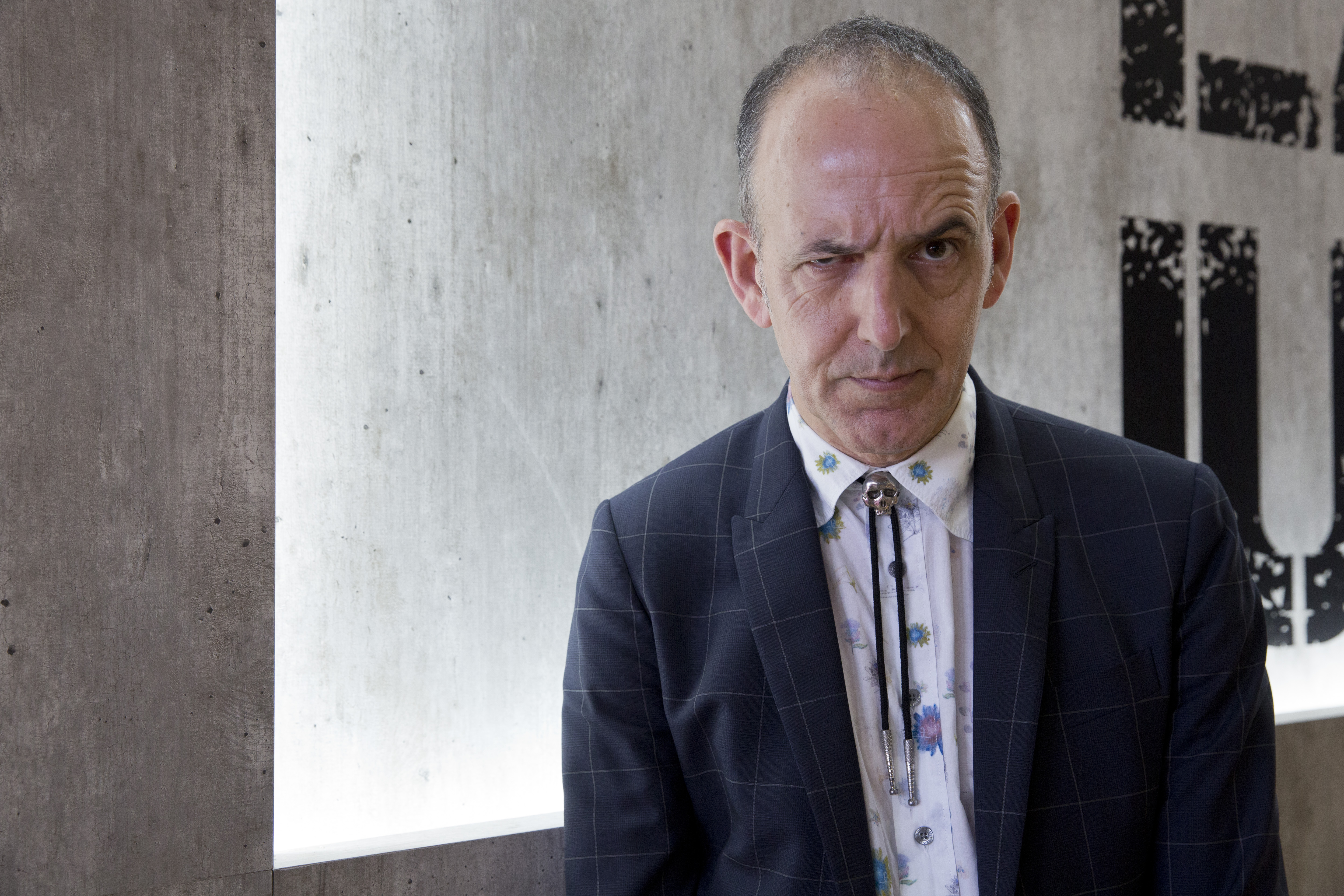 Buenos Aires, 1 de mayo de 2017. En el Stand del Ministerio de Cultura de la Nación, se llevó a cabo la entrevista: “Hablemos de terror: el boom del género que se instala cada vez más entre los chicos”. Fabiana Scherer entrevista a Chris Priestley, autor británico.